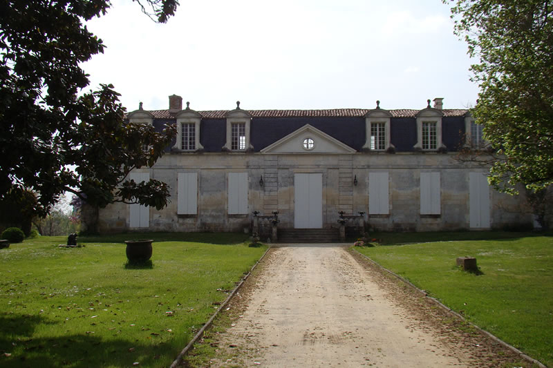 Château de la Vallade à Rétaud en Charente Maritime